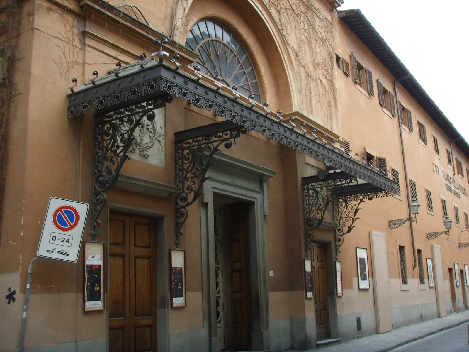 Teatro alla pegola